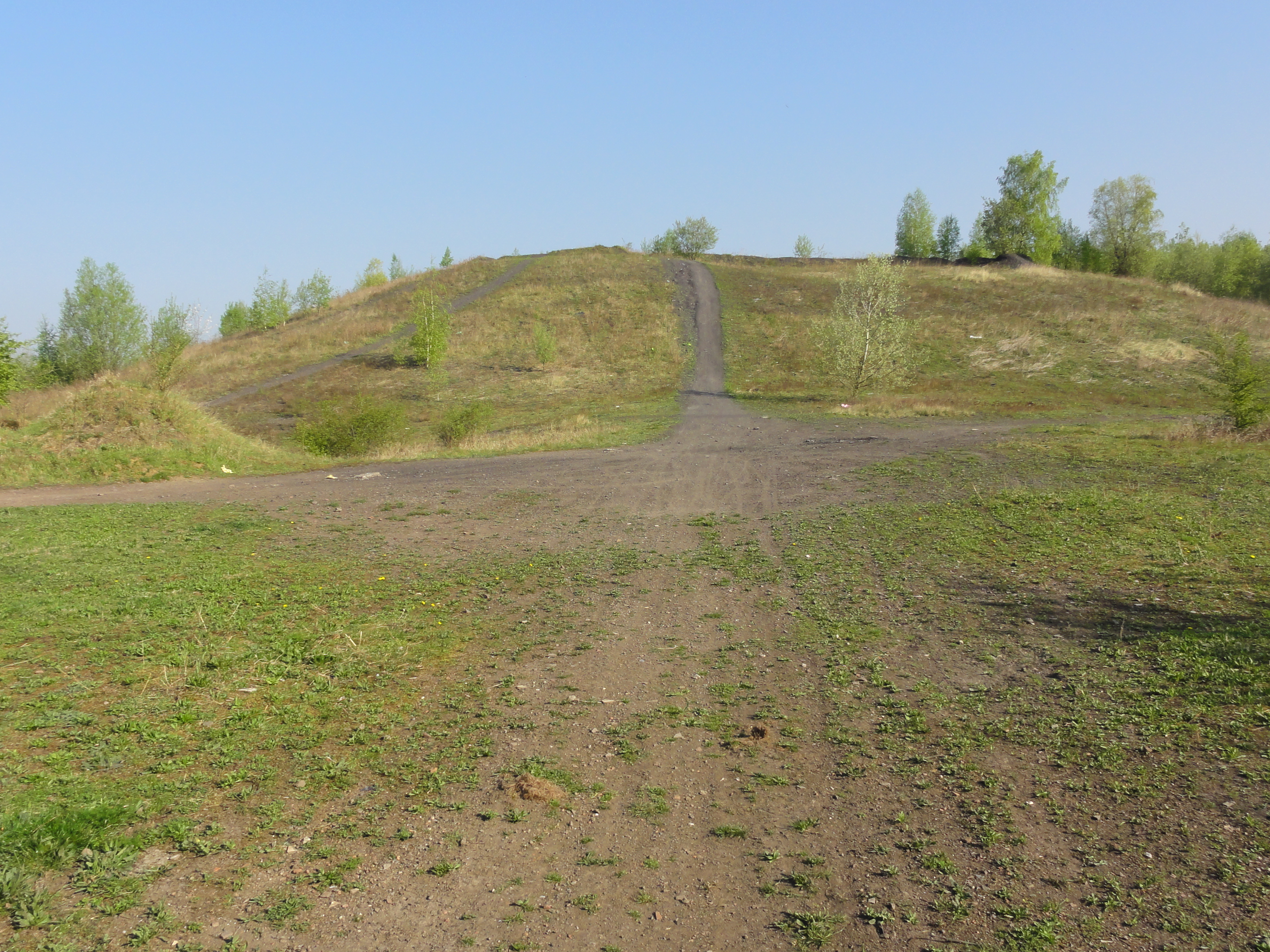 La Fosse Schneider de la Compagnie des mines de Douchy était un charbonnage constitué d'un seul puits situé à Lourches, Nord, Nord-Pas-de-Calais, France.